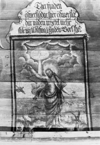 Målning på trä i korvalvet. Efter restaurering. Kategori: (03) Målningar på träMålning på trä i korvalvet. Efter restaurering.